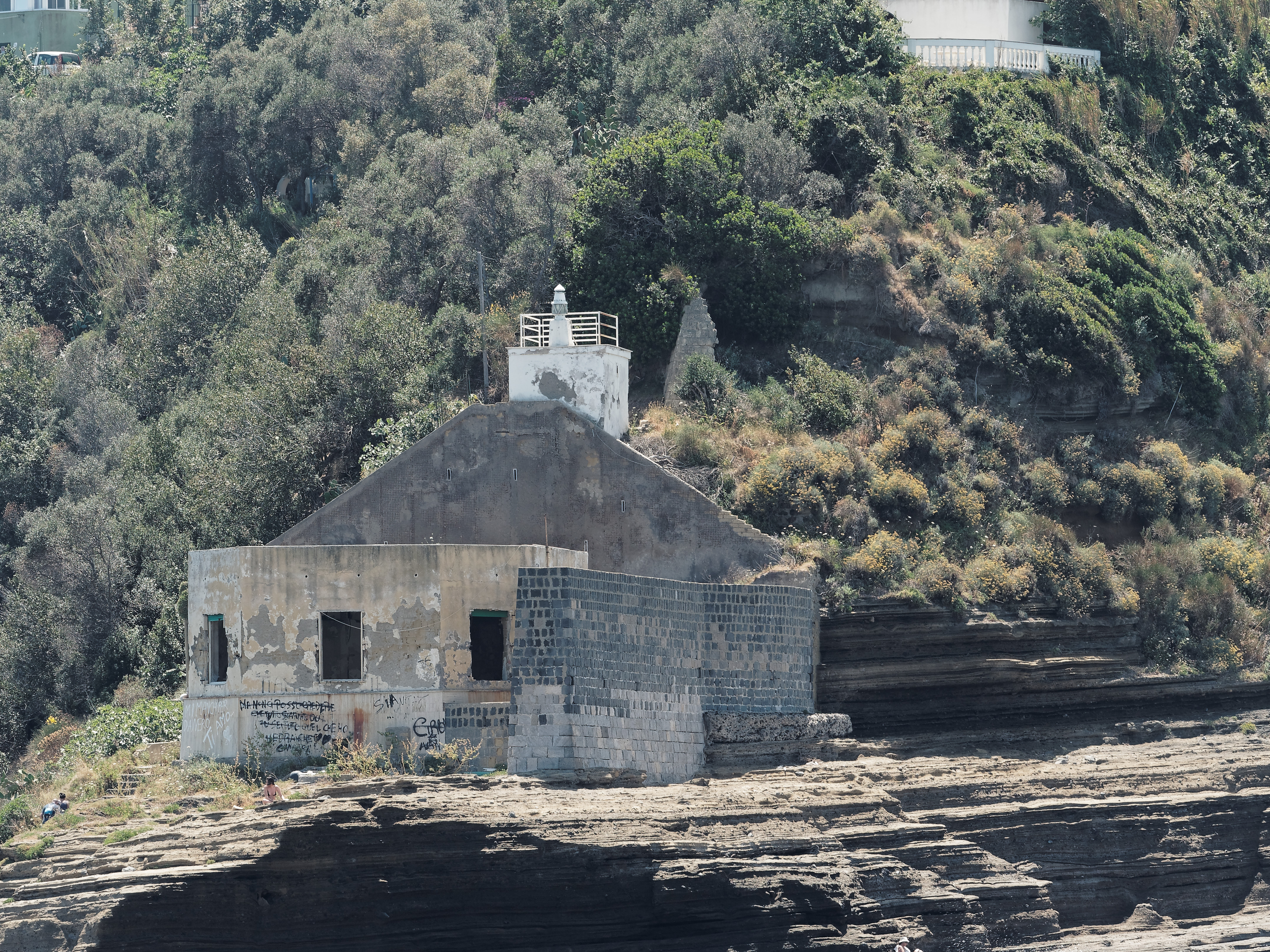 Das Leuchtfeuer Faro di Pioppeto auf der Nordseite der Insel Procida, Kampanien, Italien.